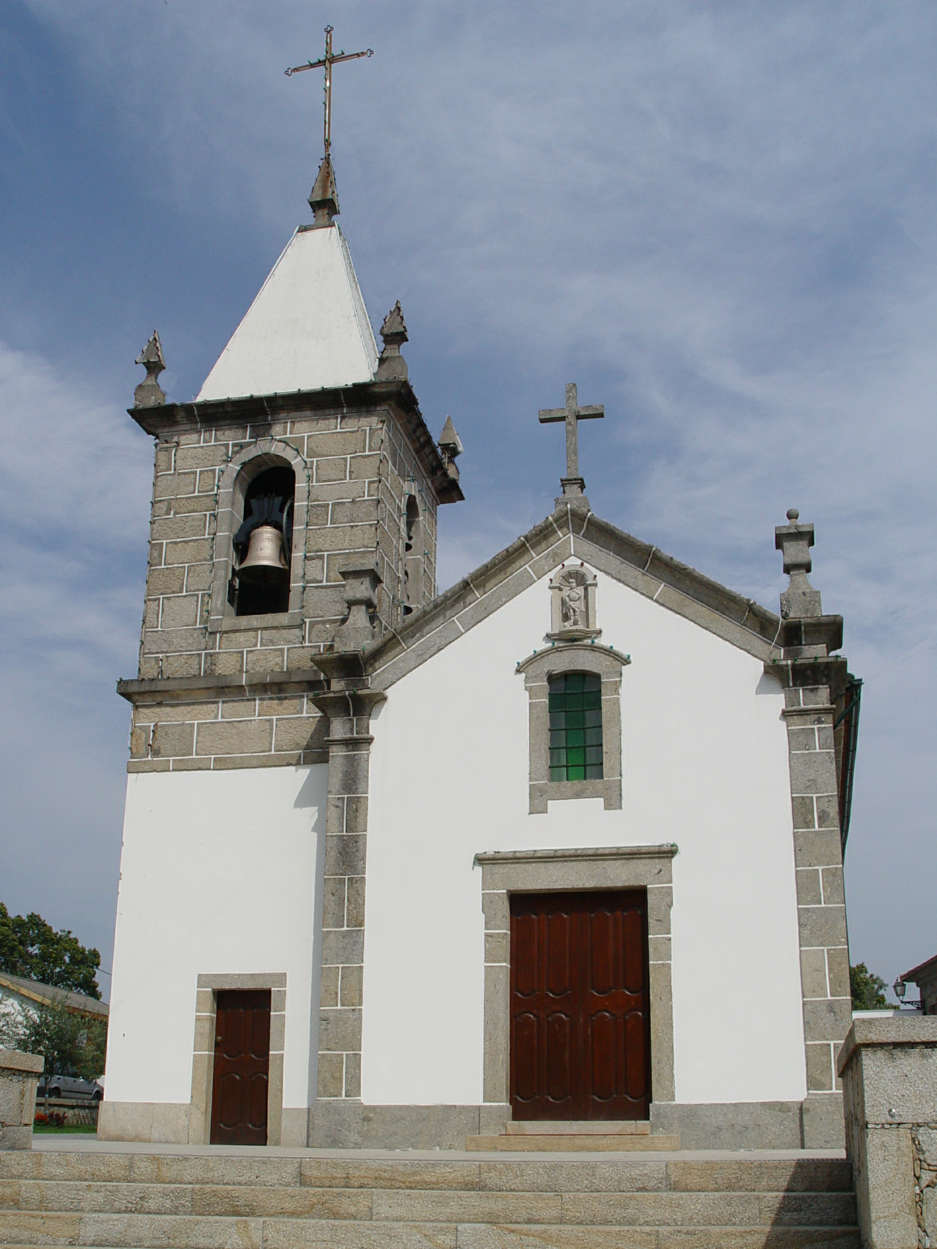 São Miguel de Carreiras Church, in Vila Verde, Portugal